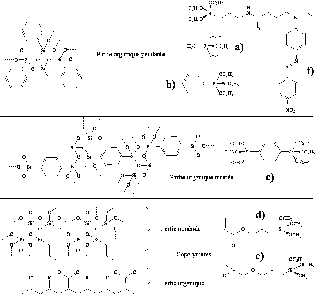 Exemples de précurseurs sol-gel utilisés pour la préparation de matériaux hybrides organiques-inorganiques : a) Methyltriéthoxysilane, b) Phenyltriéthoxysilane, c) 1,4-bis(triethoxysilyl)benzene, d) Alkoxysilane avec un groupement acrylate, e) Alkoxysilane difonctionnel avec un groupement époxyde, f) Alkoxysilane avec une molécule colorée de type azobenzène. Auteur : Frédéric Chaput, réalisé avec un programme de dessin. Licence GFDL Frédéric Chaput